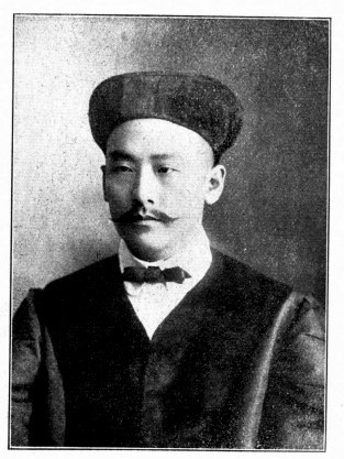 中文（台灣）: 中華民國國會議員